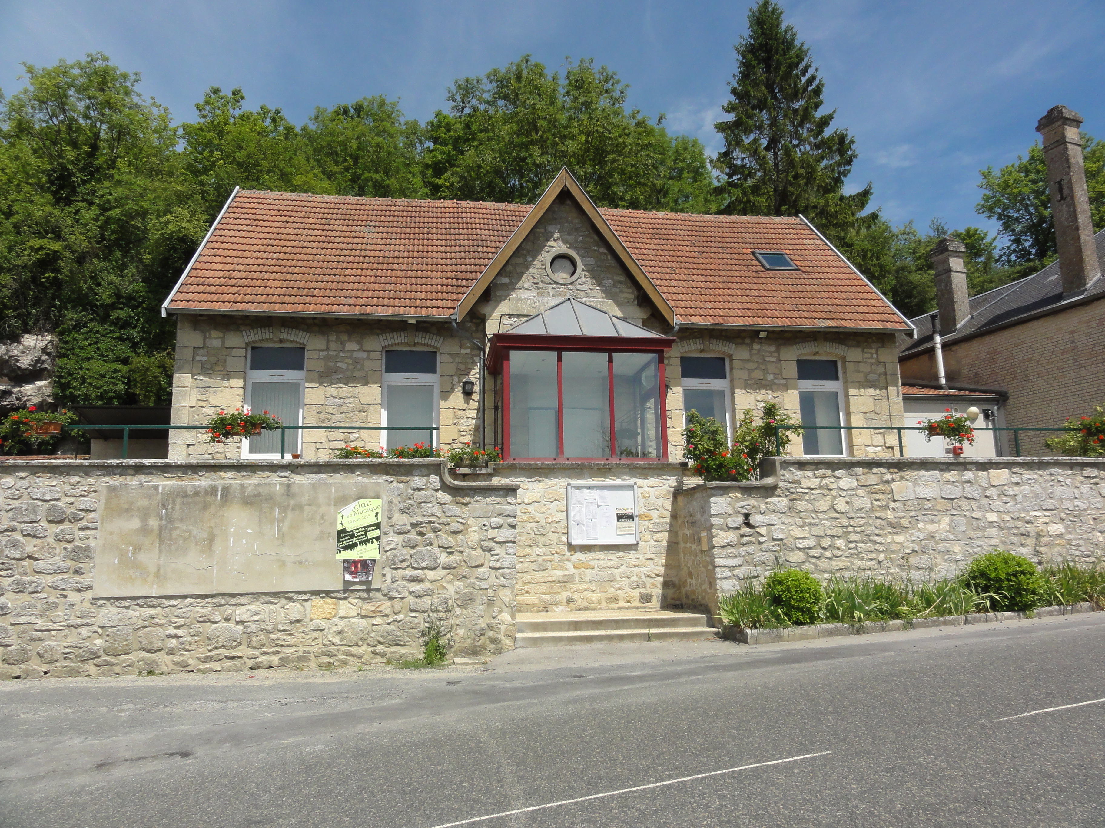 Paissy (Aisne) mairie